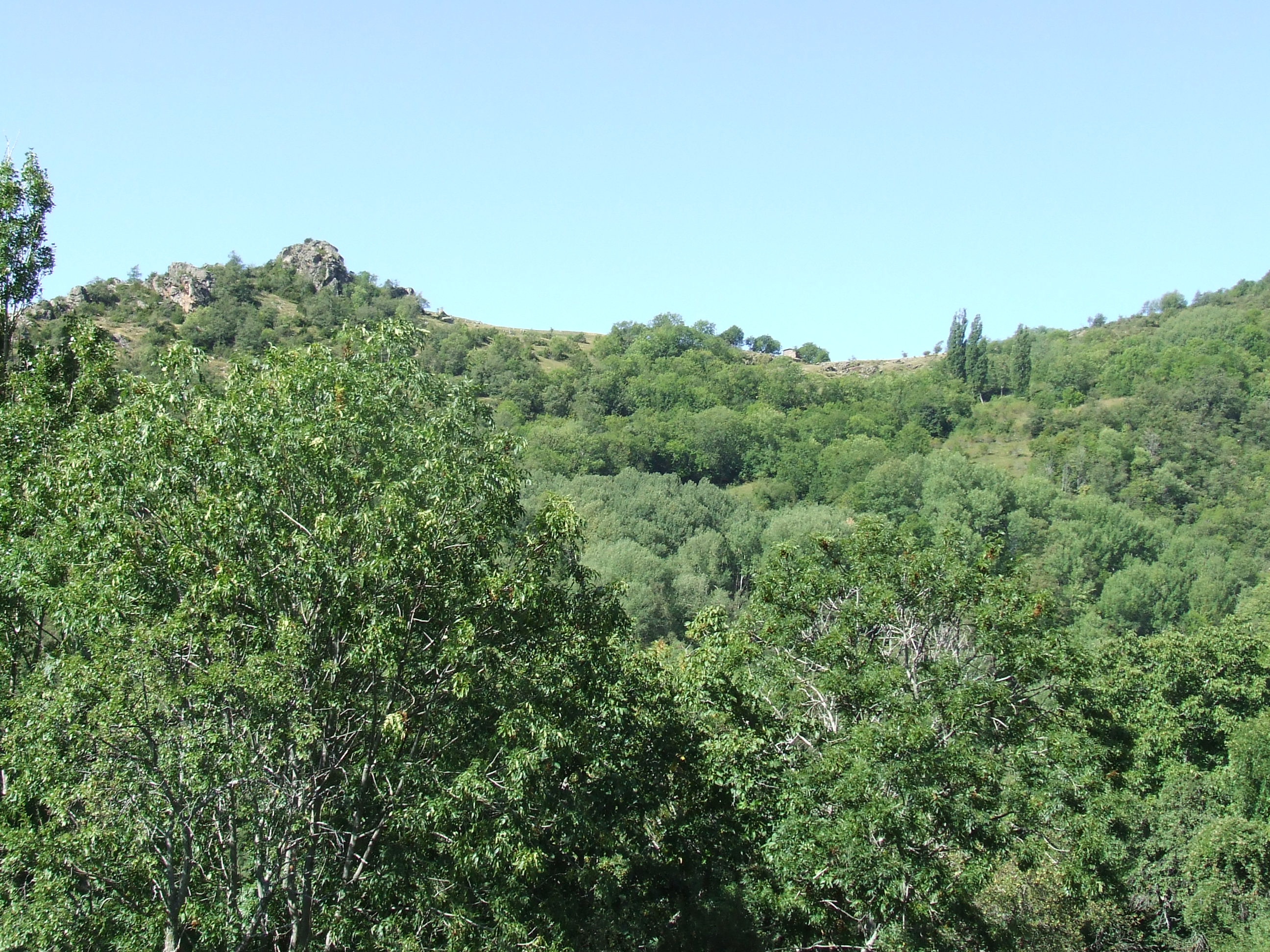 Lloc on es troba la Mare de Déu del Coll (Guiró, la Torre de Cabdella, Pallars Jussà)